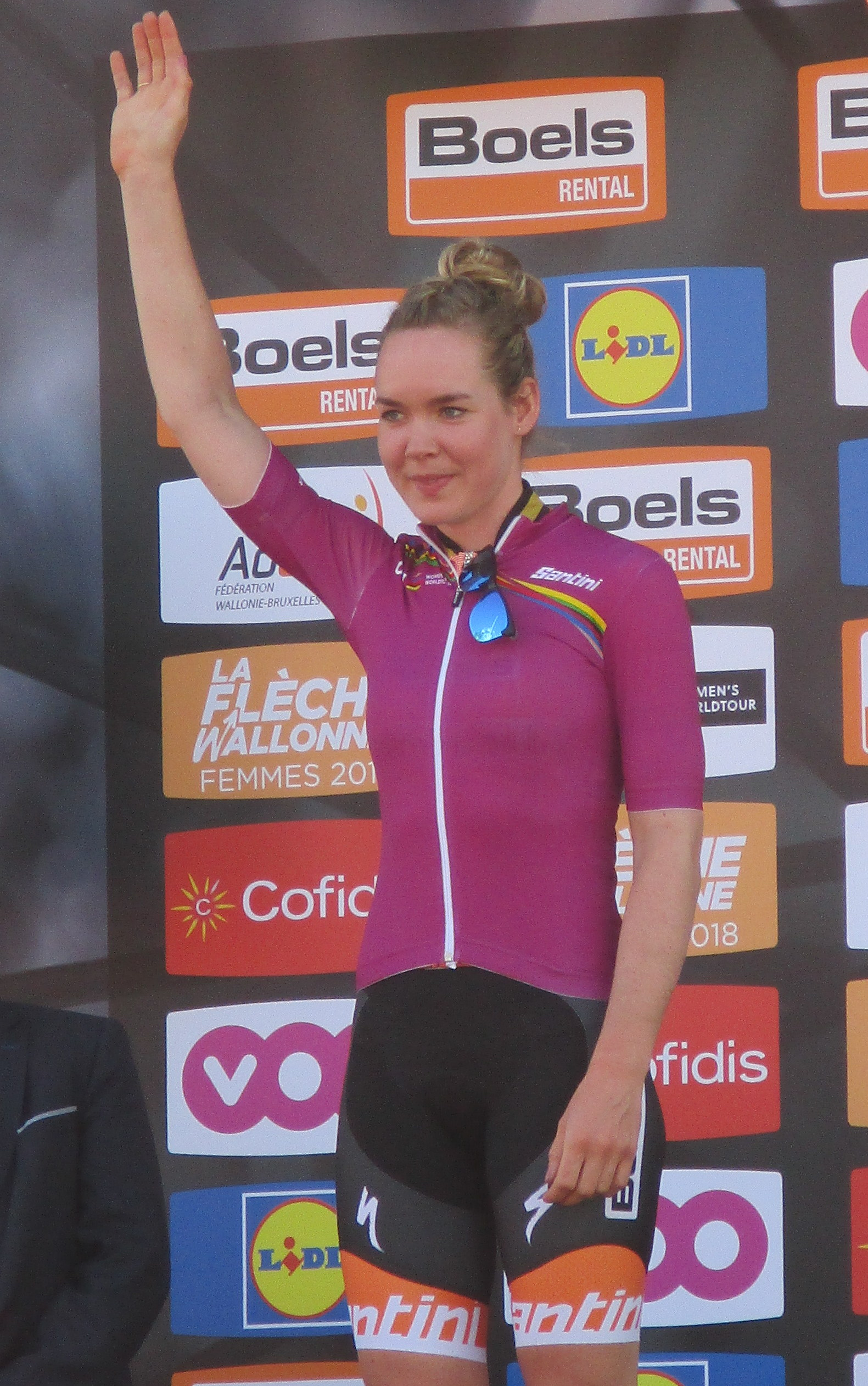 Waalse Pijl 2018 op de Mur van Huy. Nieuwe leidster in Women's World Tour: Anna van der Breggen